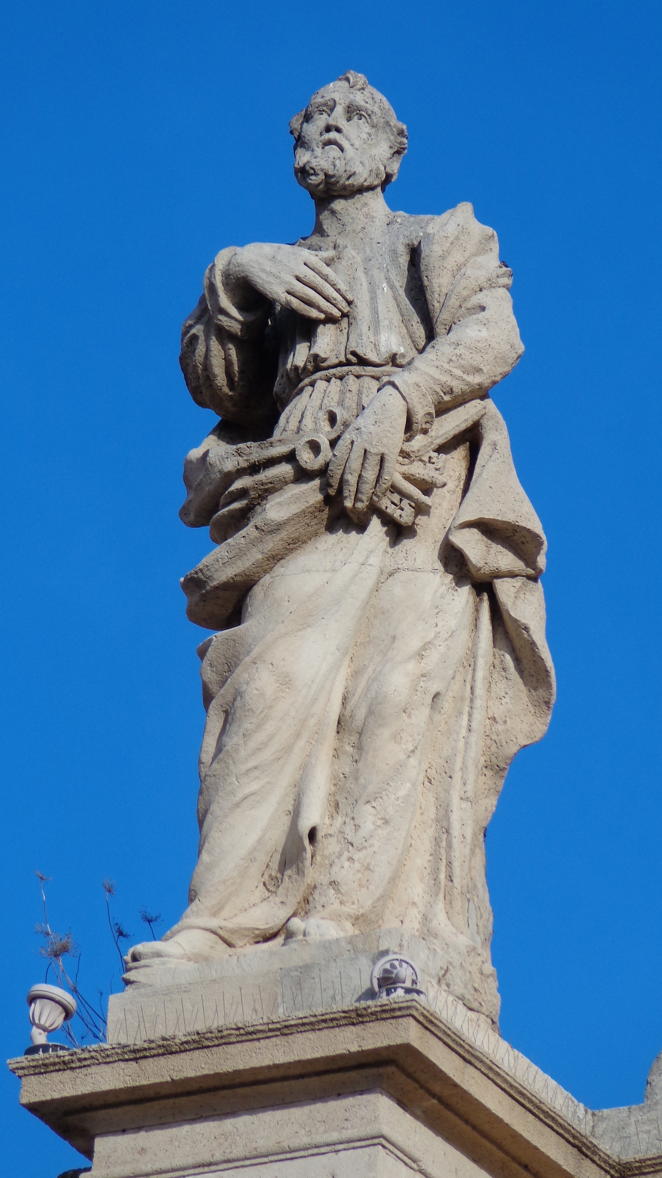 Statua balaustra